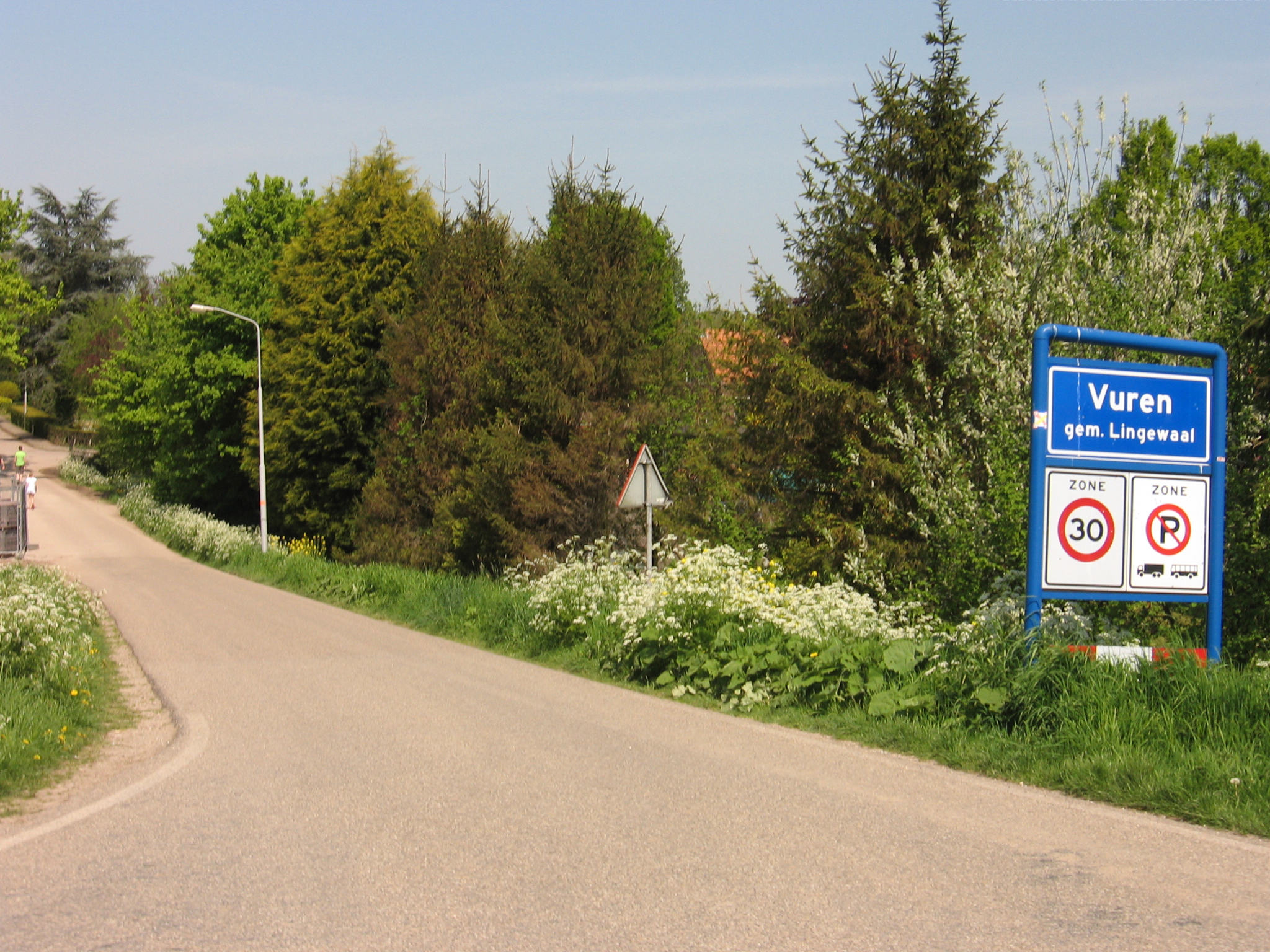 Vuren